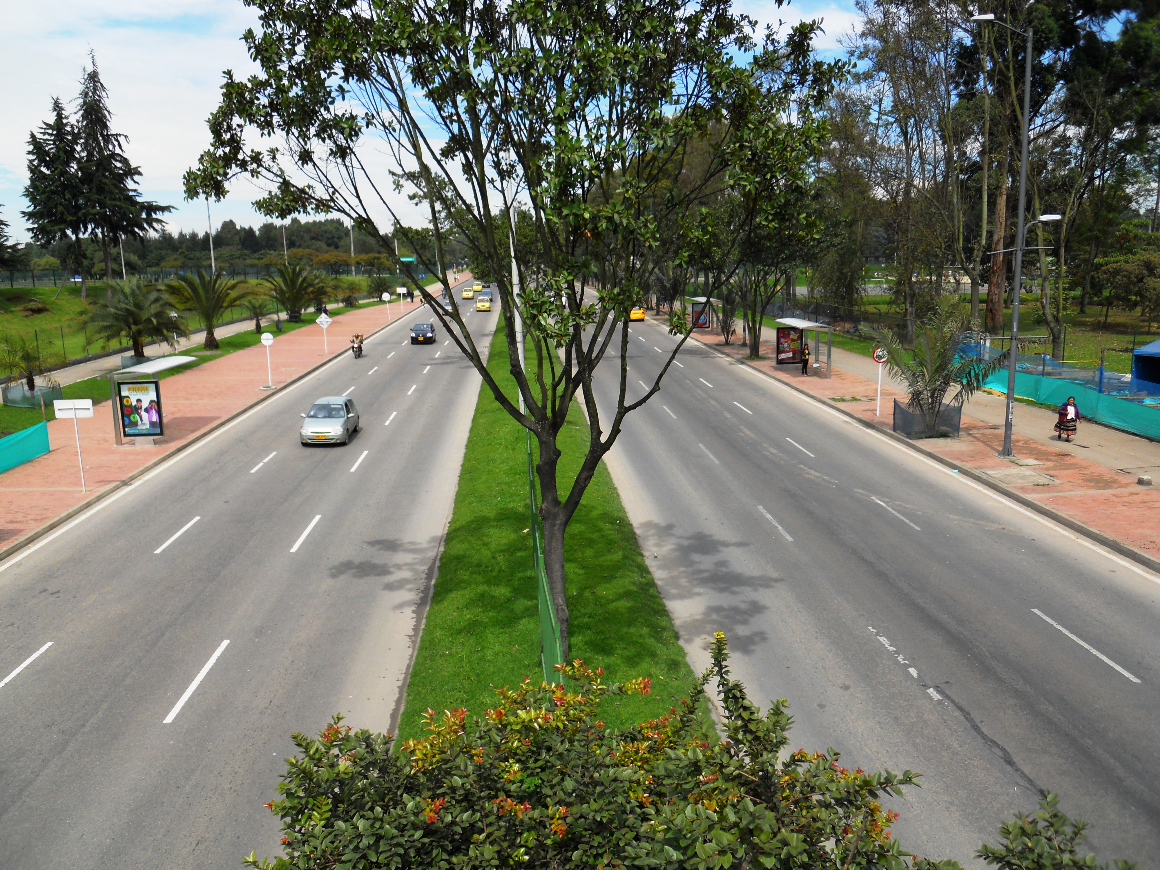 Avenida calle 63 con carrera 60.